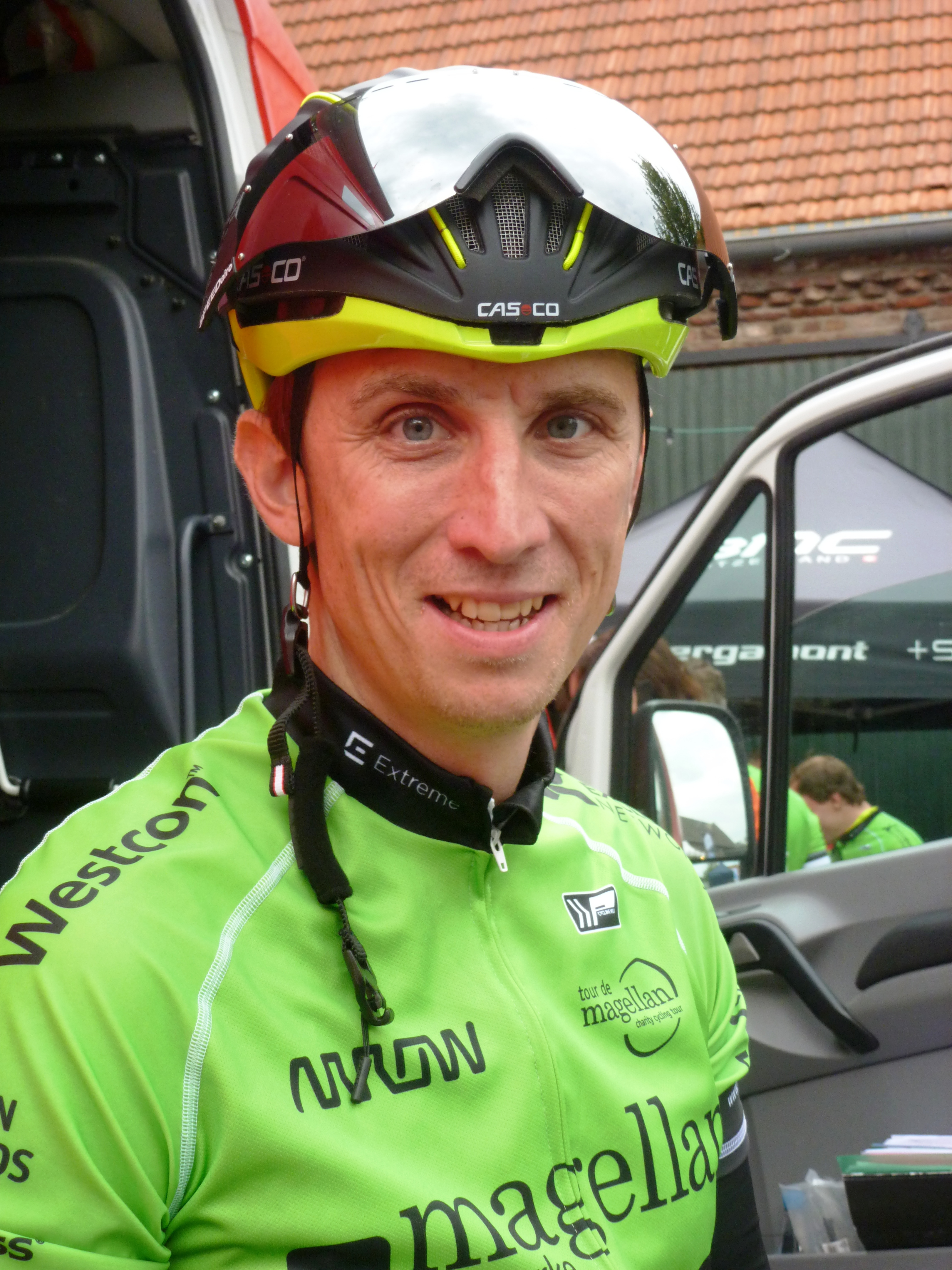 Tour de Magellan 2014, Gut Eltzhof in Köln, Alexander Aeschbach